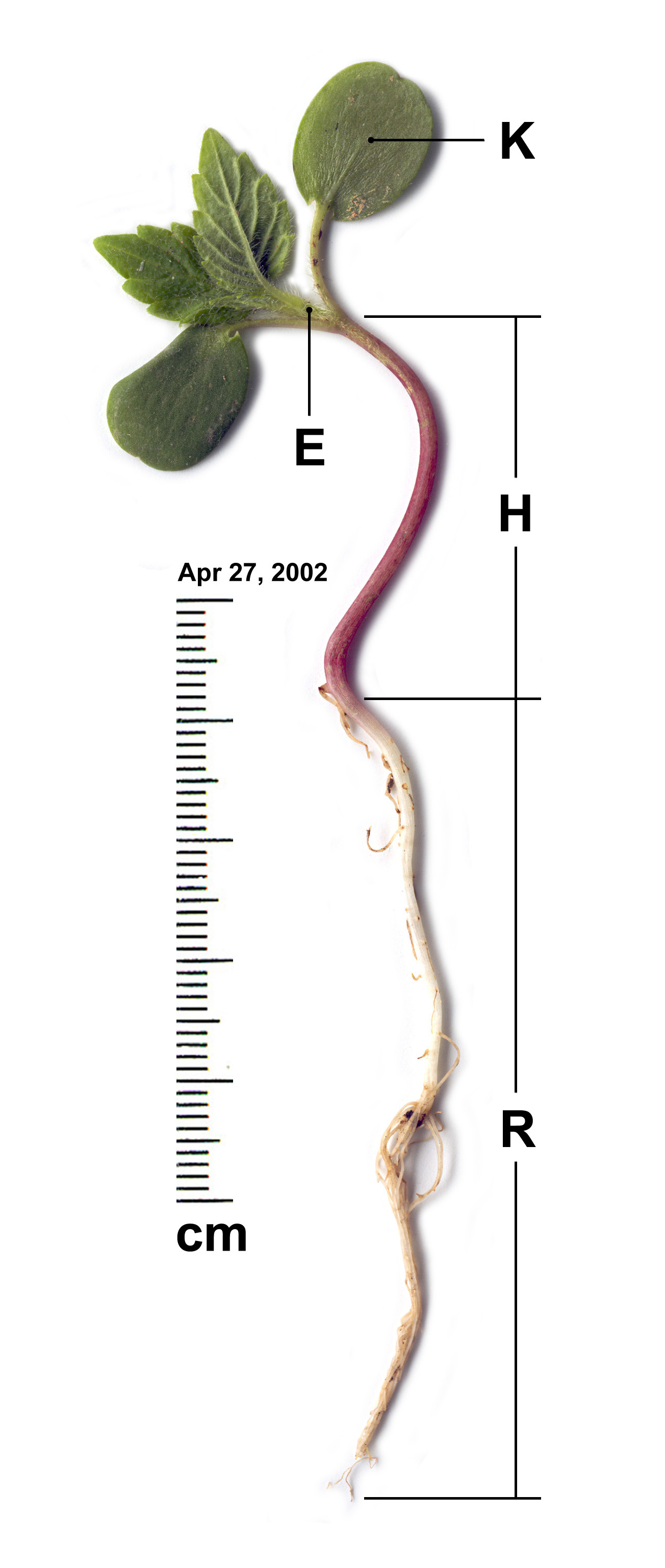 Клијавац горског бреста са Гоча (скен: Михаило Грбић)